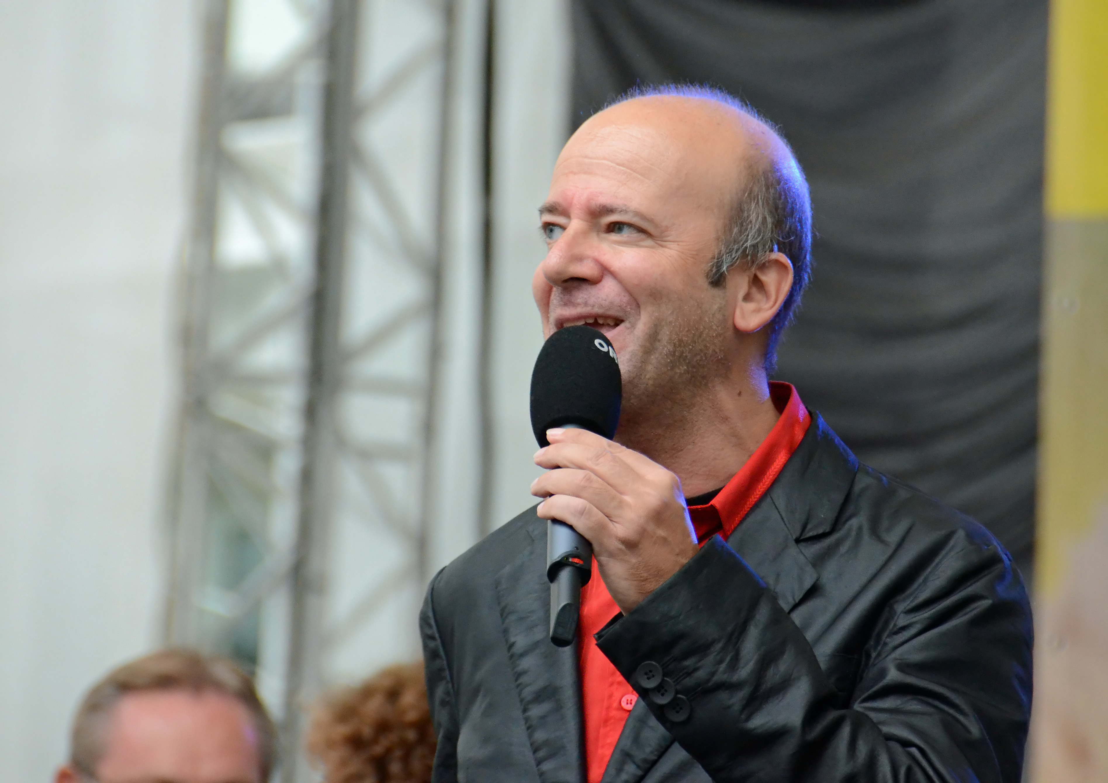 Österreichischer Rock'n' Roll Sänger